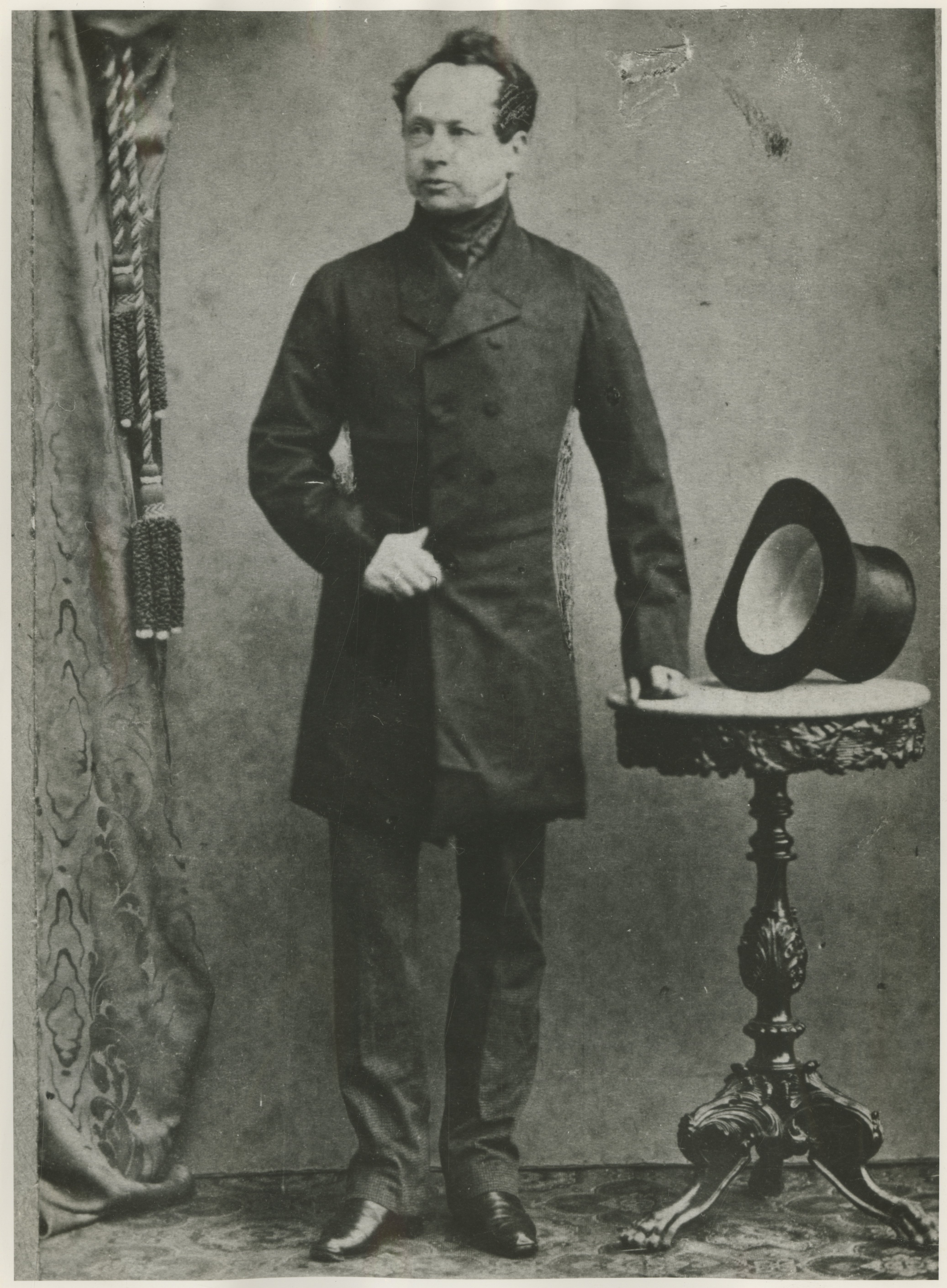 Mr. A.J.L. baron Stratenus, minister van Buitenlandse Zaken, 1 februari 1862 tot 2 januari 1864 Identificatienr.: 1.67383 Vervaardiger naam: [ onbekend ] Datering: ca. 1863 Object: zwart-witfoto Afmetingen: (h x b) 24 x 17 cm Aanwinstnummer: 1963/181